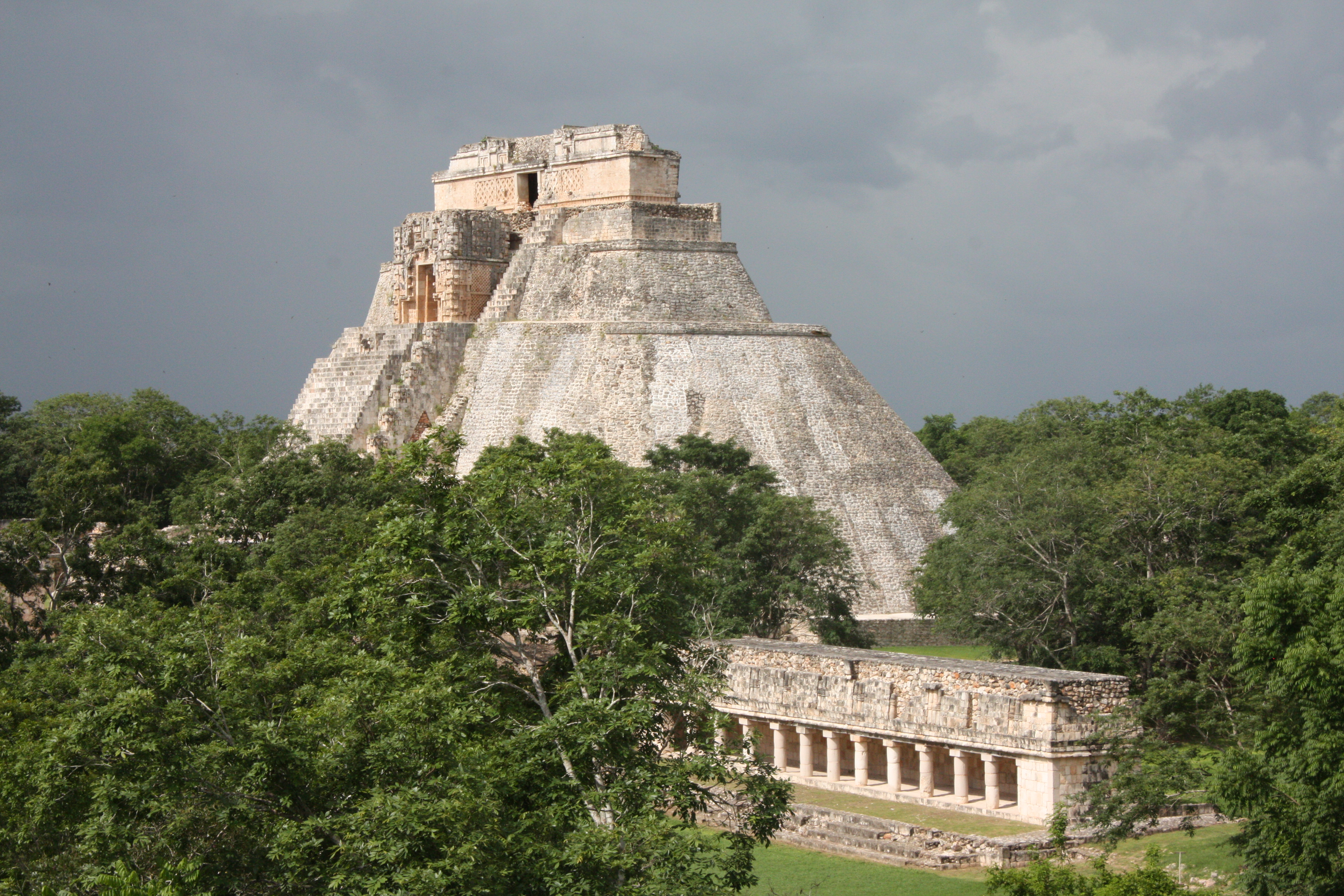 Uxmal - Pirámide del adivino